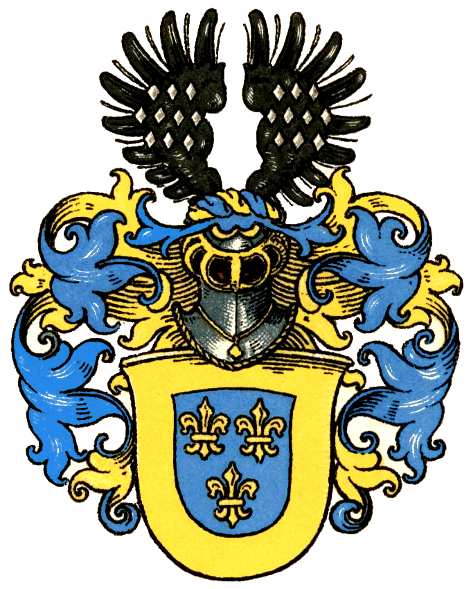 Wappen der Familie von Bischopinck.